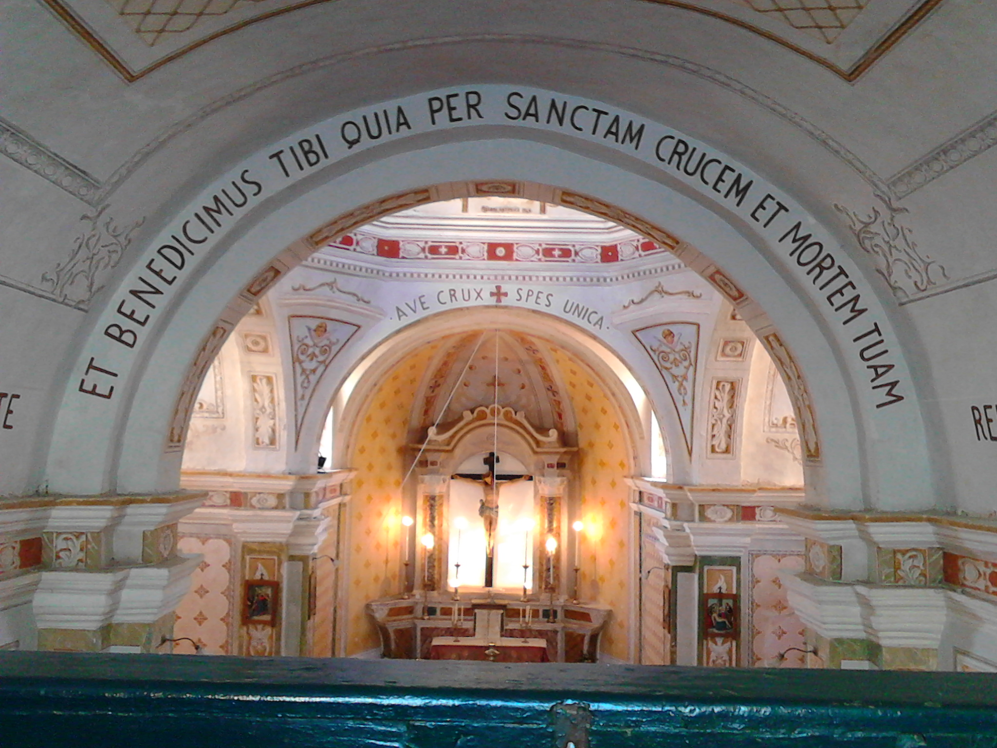 Vista verso l'altare dell'interno della chiesa